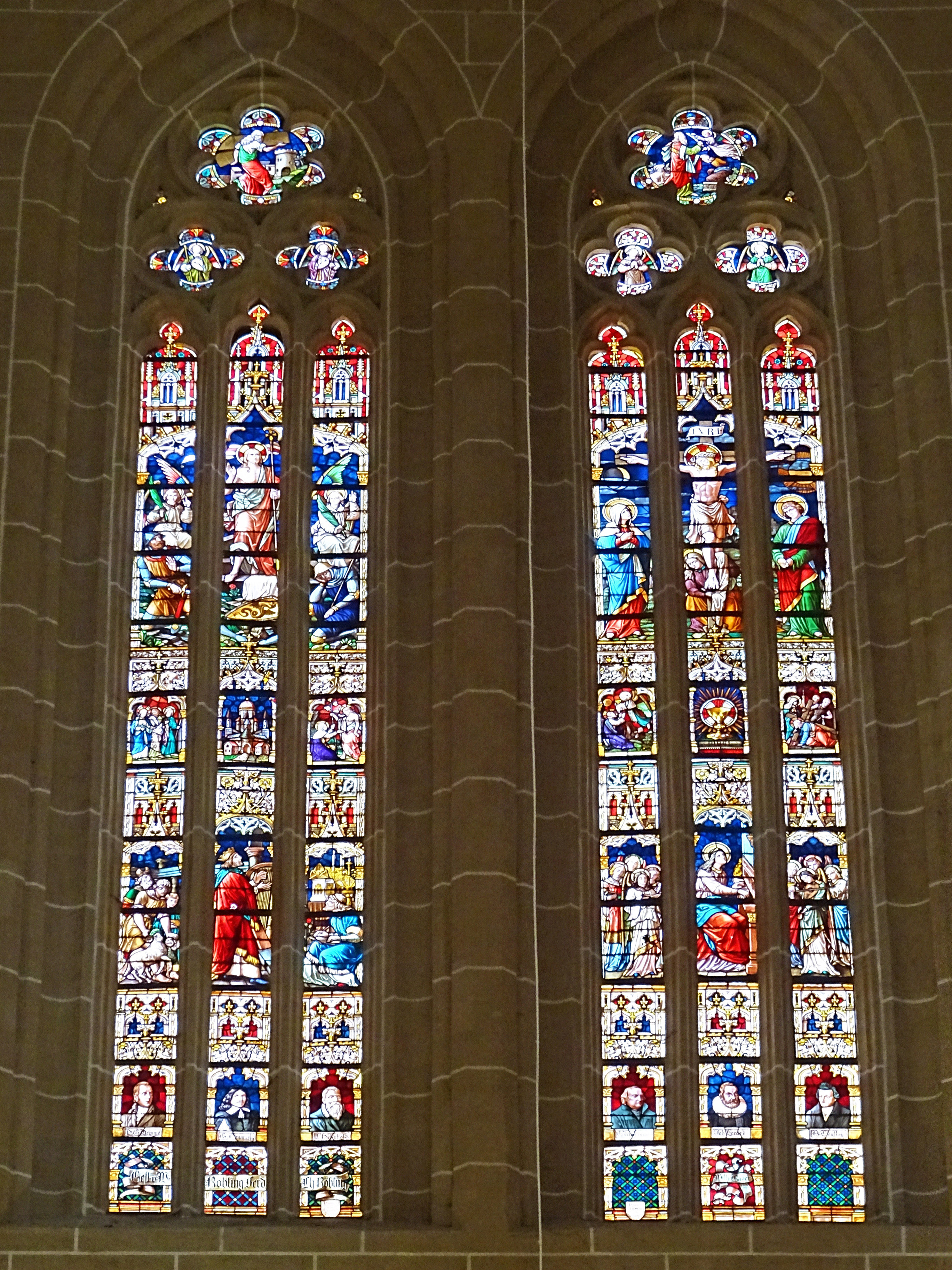 Buntglasfenster in der Marienkirche (Mühlhausen)